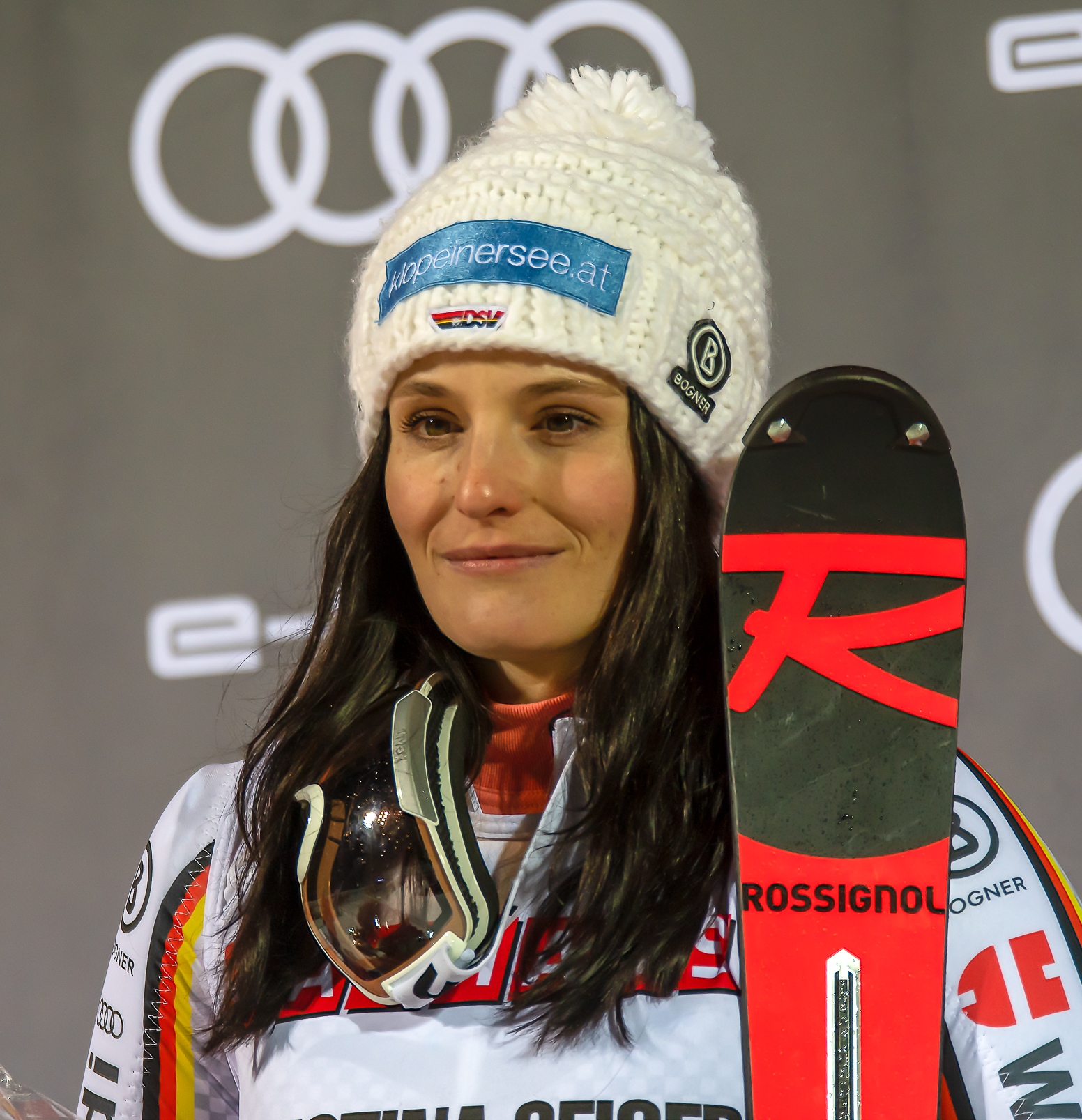 FIS Alpine Skiing World Cup in Stockholm 2019